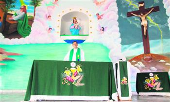 Igreja verde em função do padre ser palmeirense